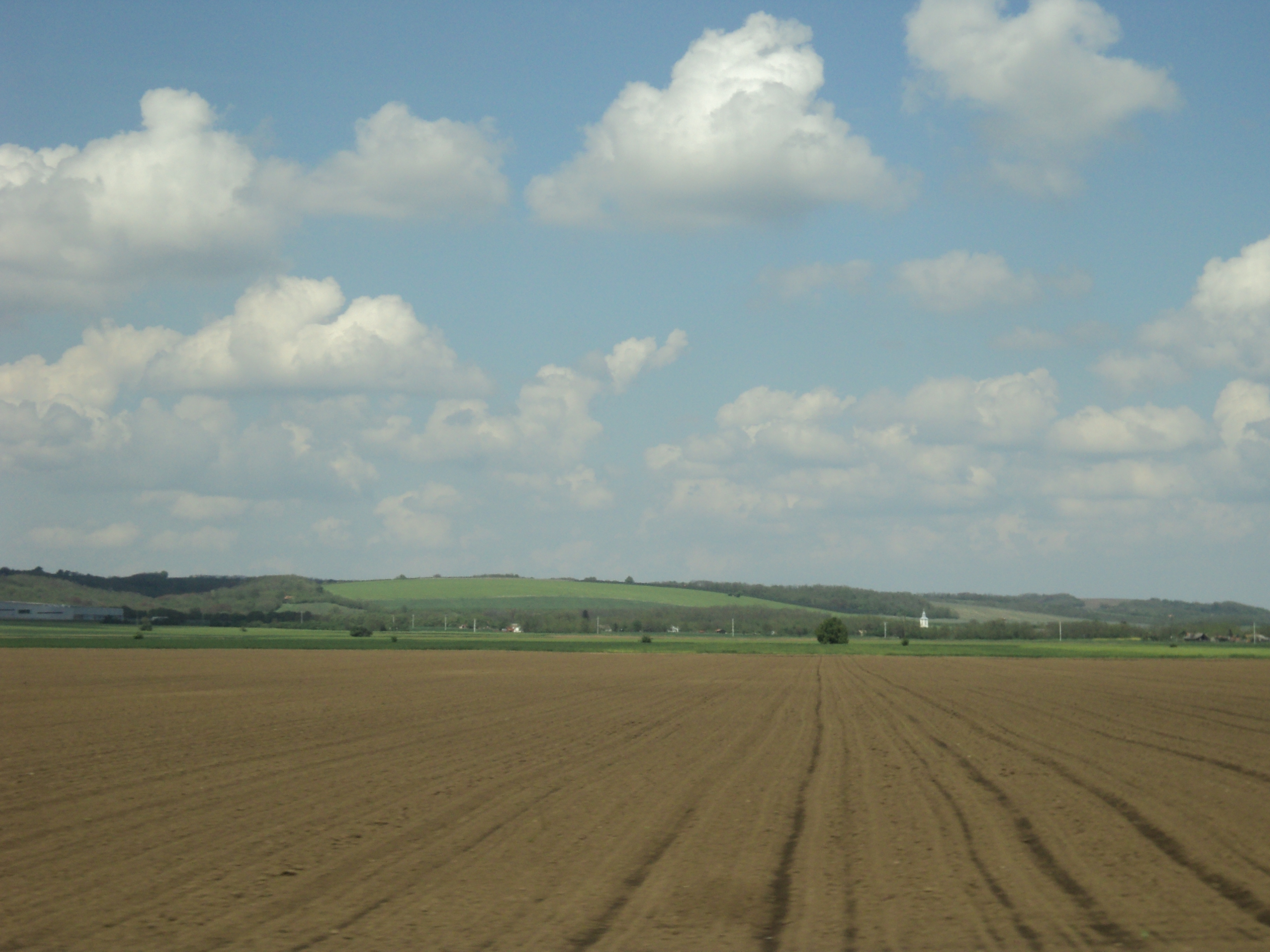 Uzvisina Banska kosa kod Belog Manastira